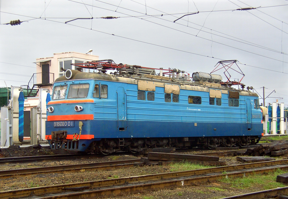 С завода поступил в депо Кавказская С-Кав В 1969 году — модернизирован, игнитронные выпрямители были заменены полупроводниковыми. Электровоз получил обозначение ВЛ60ПК-001. Передан на Донецкую ж.д. как музейный экспонат КР Ростовский ЭРЗ 10.1992 г.